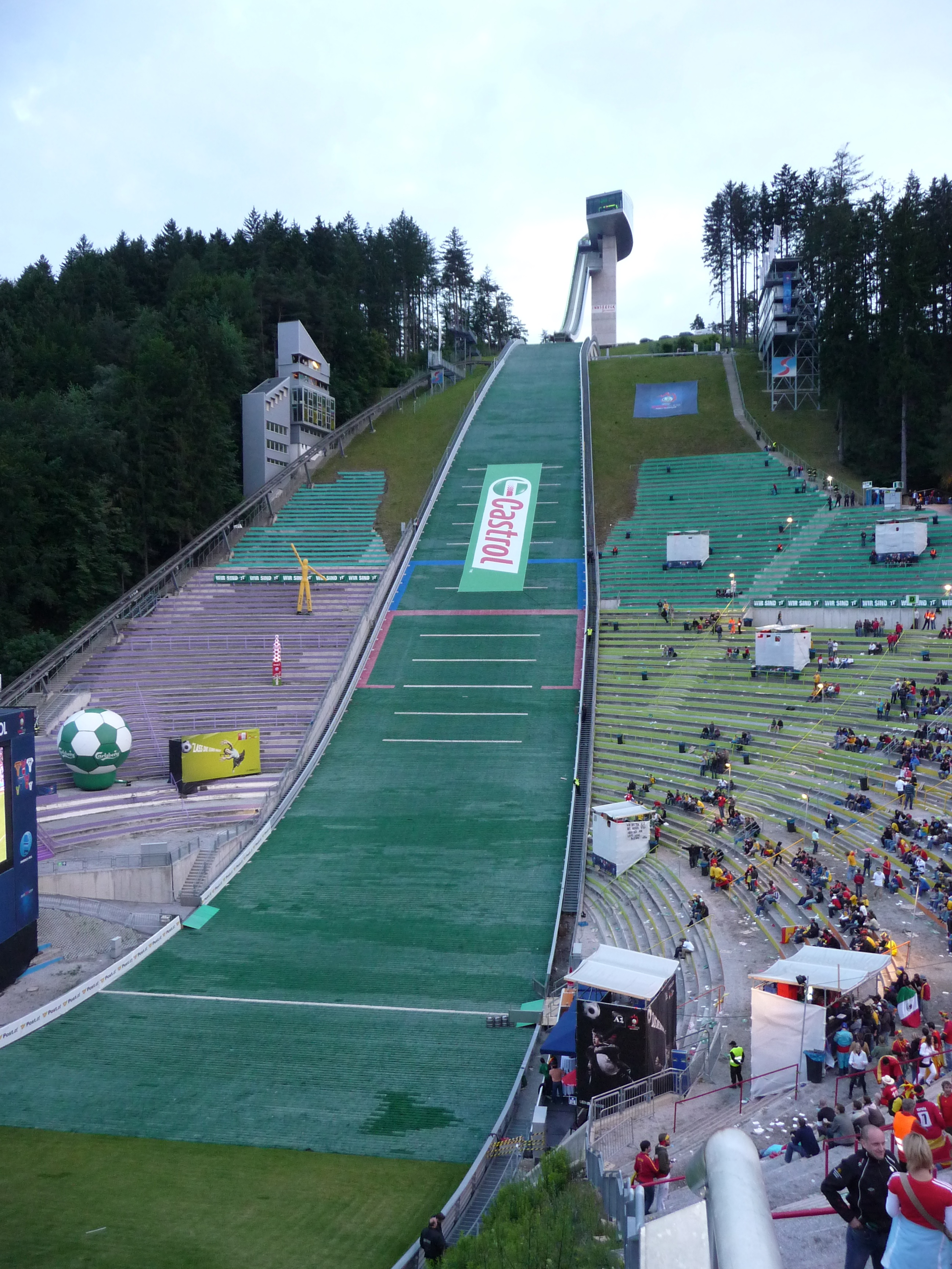 Bergisel-Schanze in Innsbruck, Austria